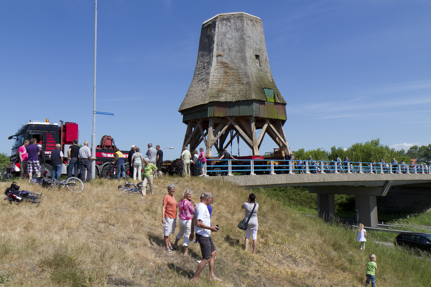 't Zand - Verplaatsing molenromp De Hoop